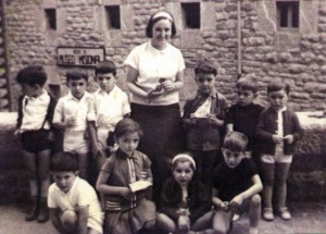 Kontxita Beitia Pasaiako ikastolako umeekin Arantzazun kurtso bukaeran1962an